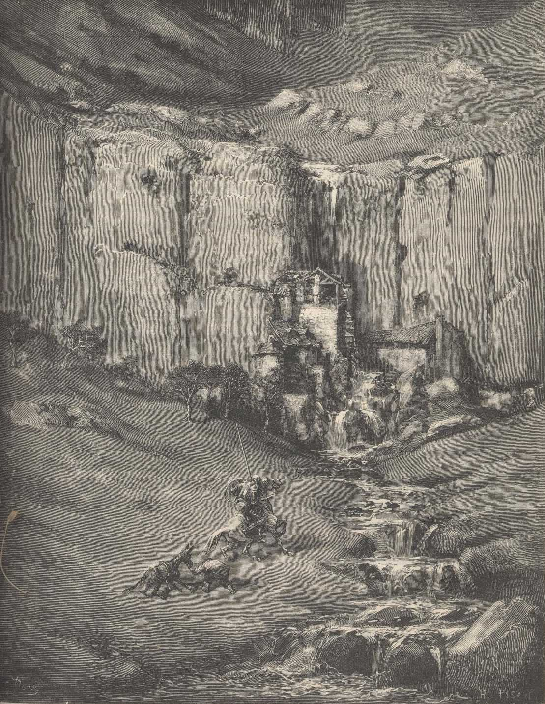 Dom Quixote e Sancho Pança aproximando-se do pisão